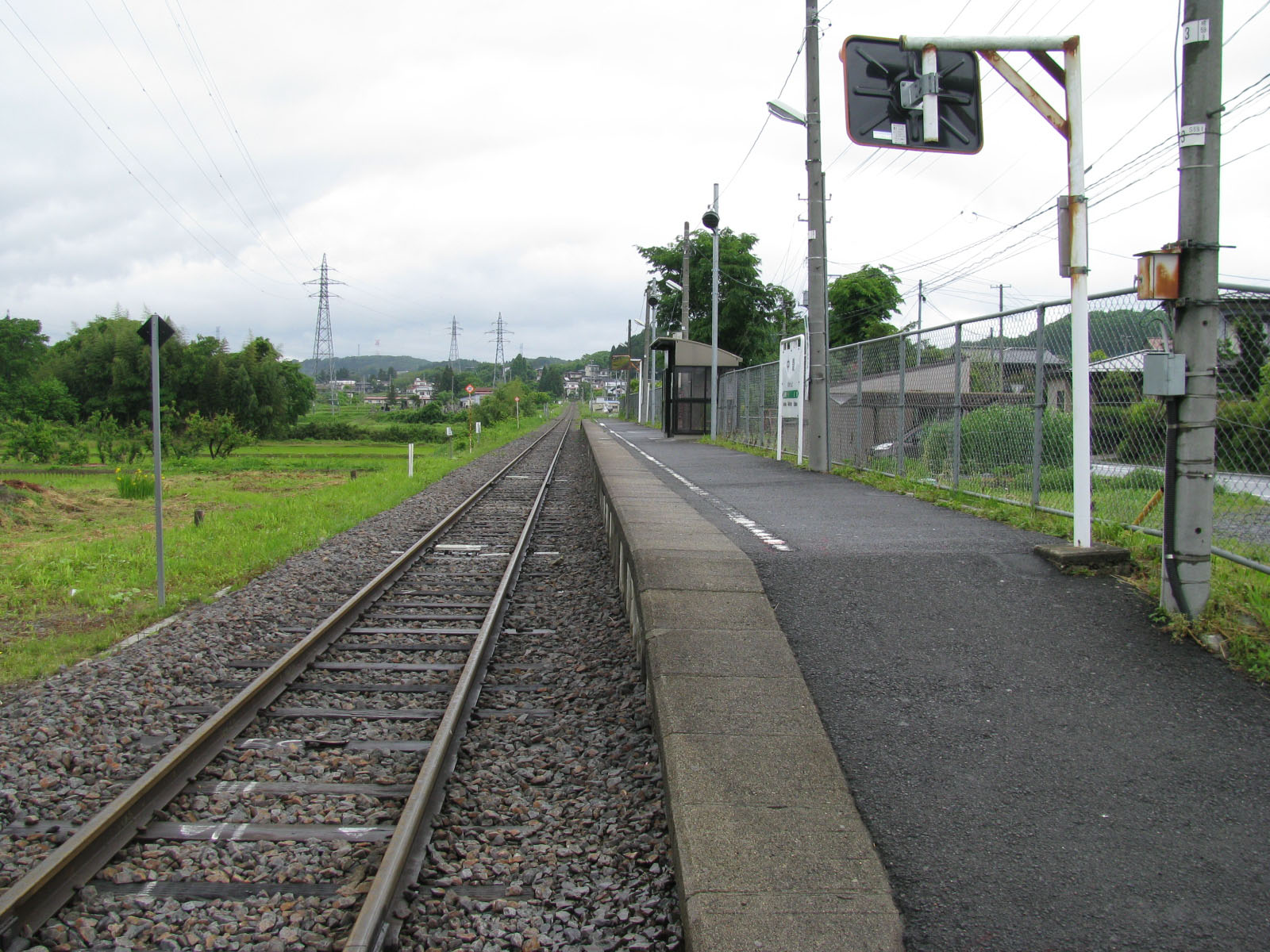 JR水郡線中豊駅